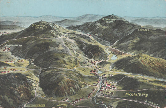 Eugen Felle: Fichtelberg (Bayern) im Fichtelbebirge, Ansichtskarte